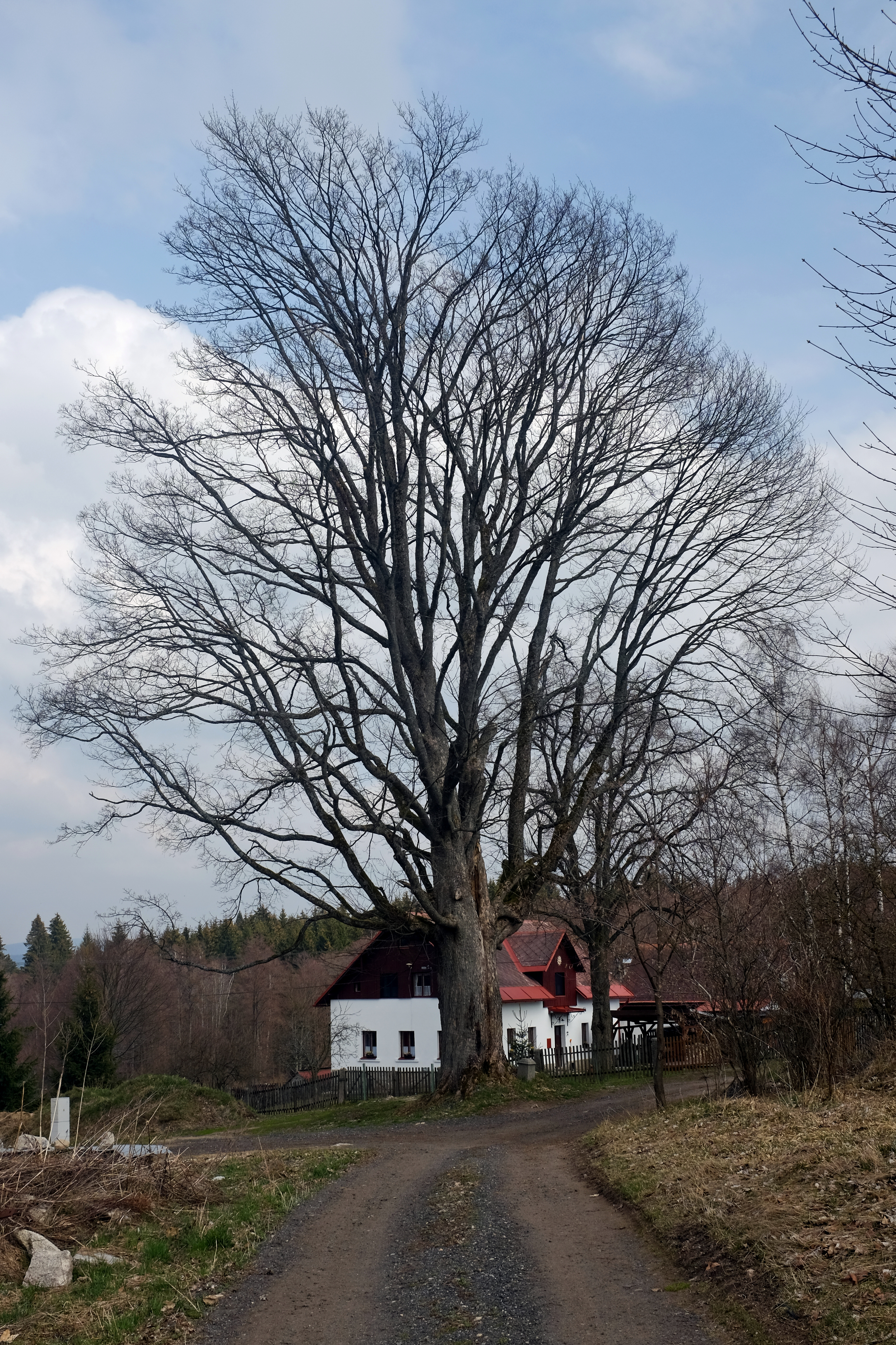 Památný strom - Klen v Heřmanově - Heřmanov (Jindřichovice), okres Sokolov